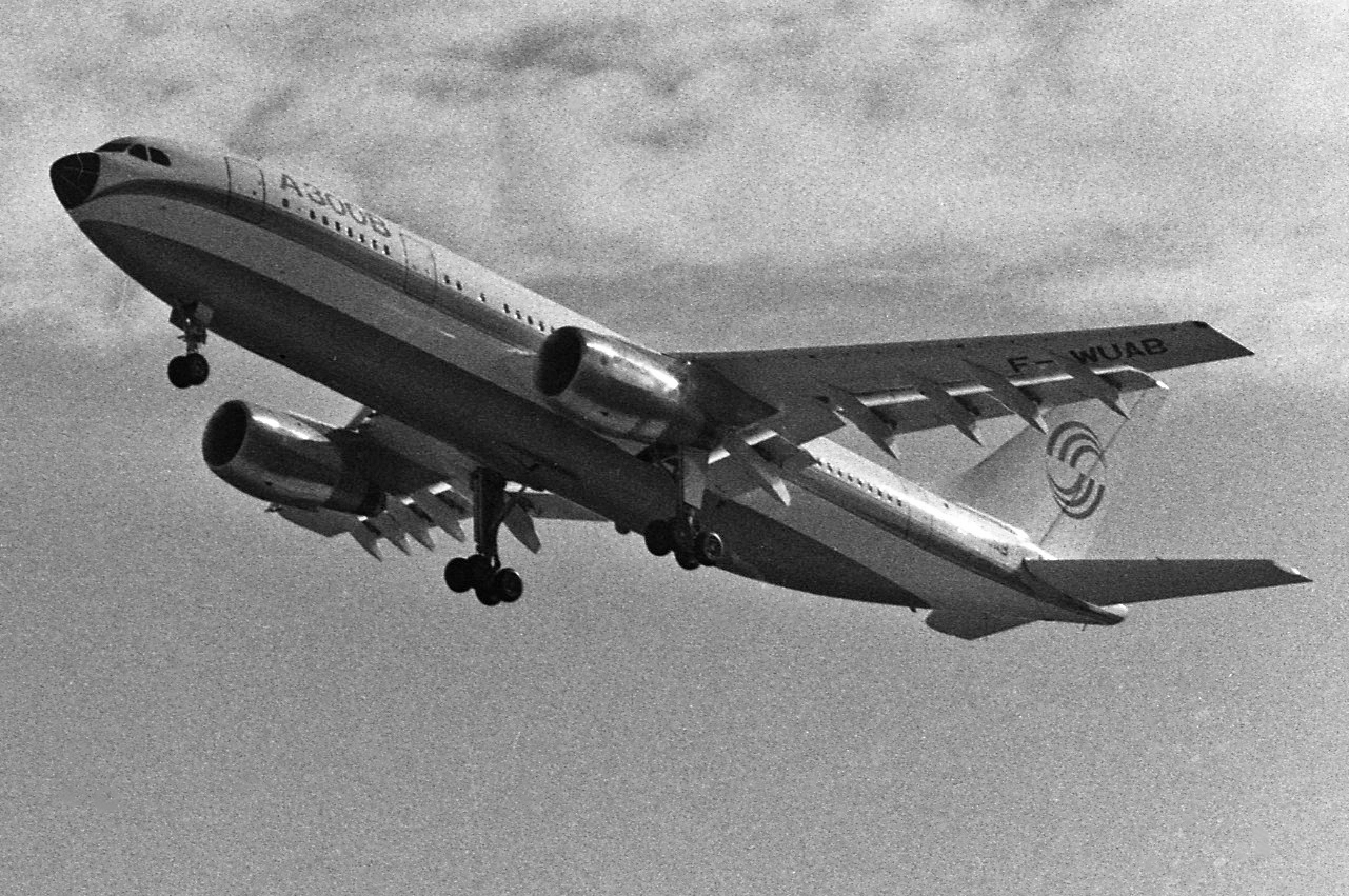 Pistes de Blagnac. 28 octobre 1972. Vue d'ensemble de côté de l'Airbus A300 B en vol. Cliché pris lors du 1er vol d'essai de l'avion.